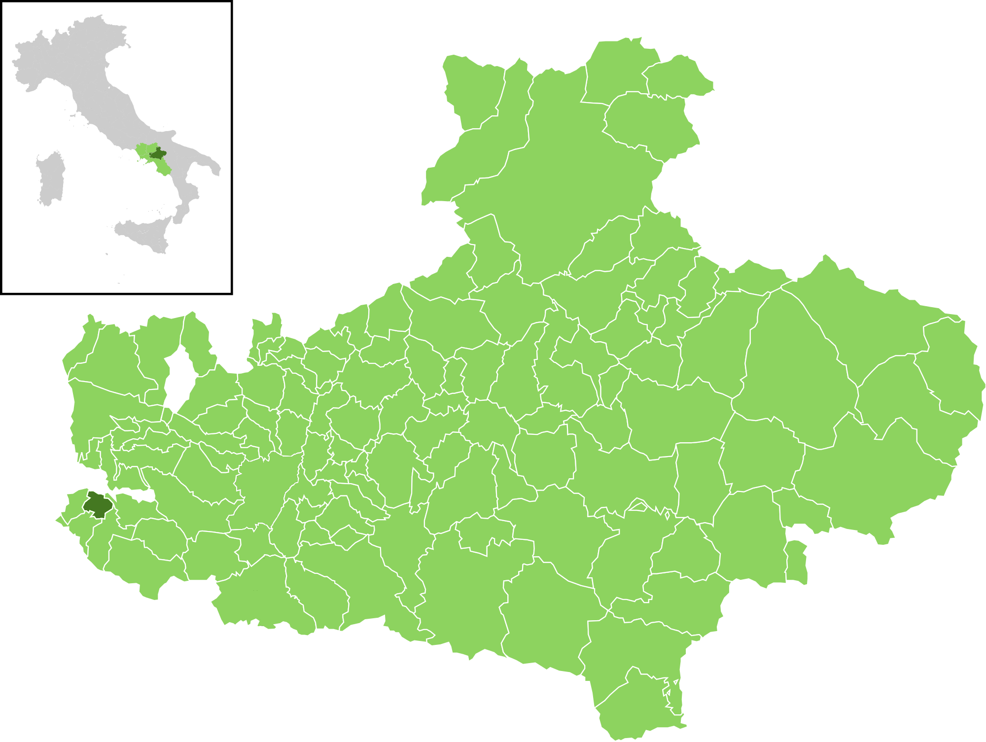 Posizione del comune all'interno della provincia di Avellino